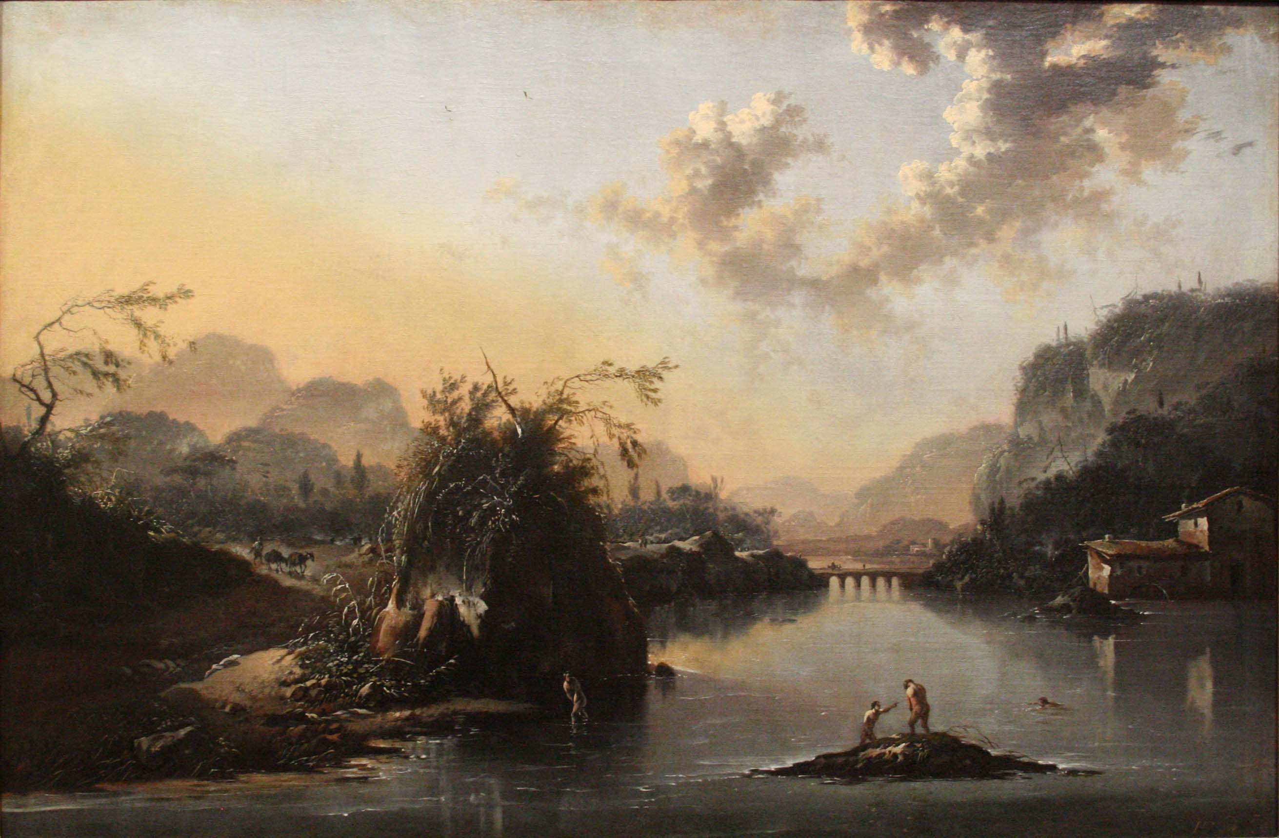 Paysage aux baigneurs